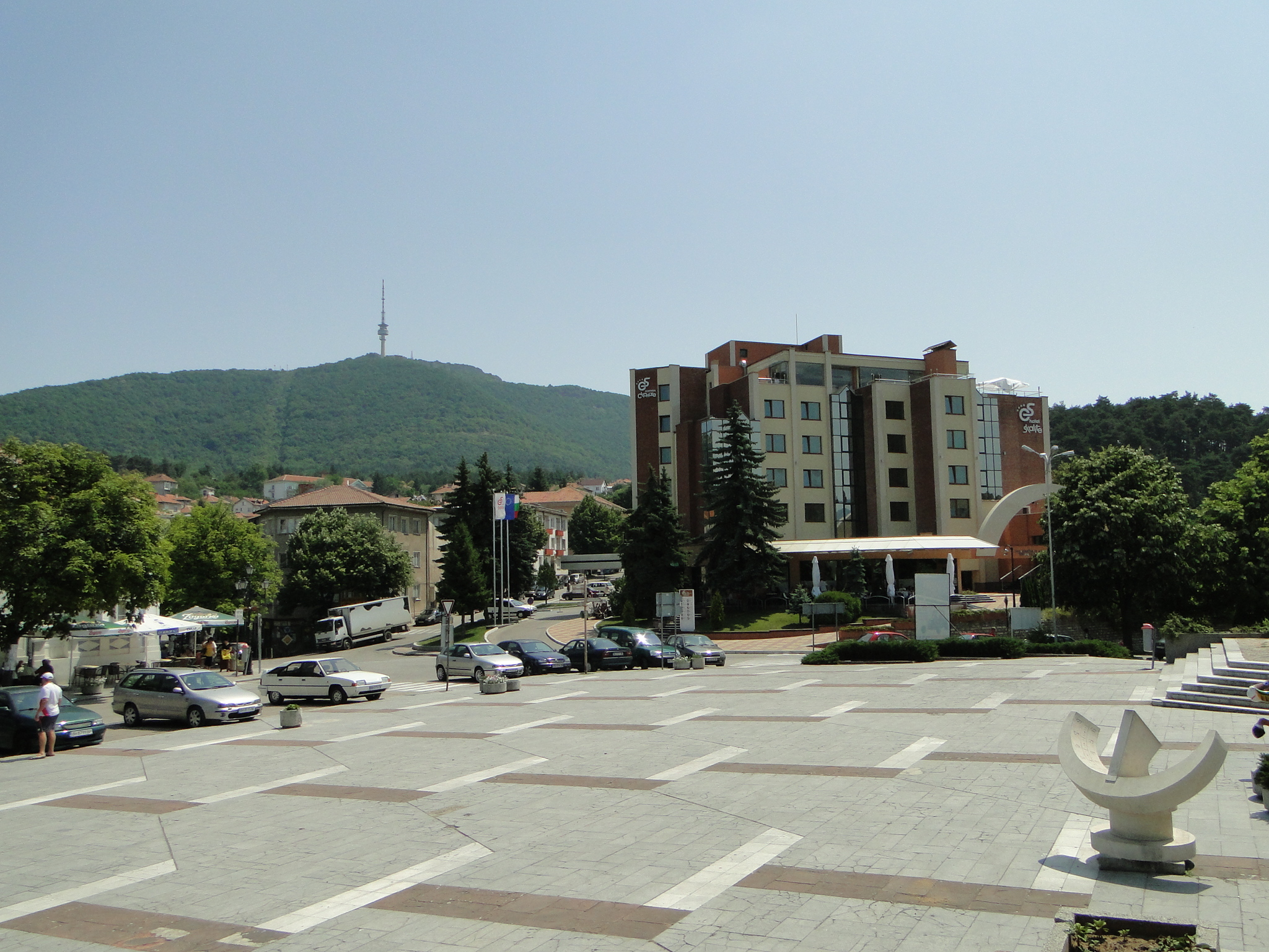 Белоградчик